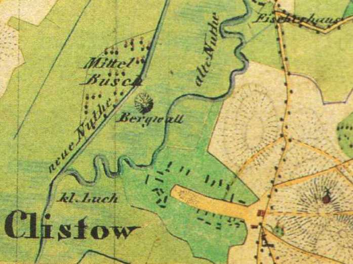 Kliestow, Stadt Trebbin, Brandenburg, Deutschland, Urmesstischblatt Blatt Trebbin 3745, von 1840